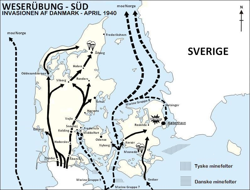 Description: Invasion of Denmark, April 9, 1940 (Danish) * Source: Own map, based on the maps in the book "9. April - De så det ske" by Lars Lindeberg (ISBN: 87-7258-504-8) * Author: Realismadder, 3rd January 2008 * Beskrivelse: Invasjonen av Denmark 9. april 1940 * Kilde: Laget selv basert på kart i boken "9. April - De så det ske" by Lars Lindeberg (ISBN: 87-7258-504-8) * Laget av: Realismadder, 3. januar 2008